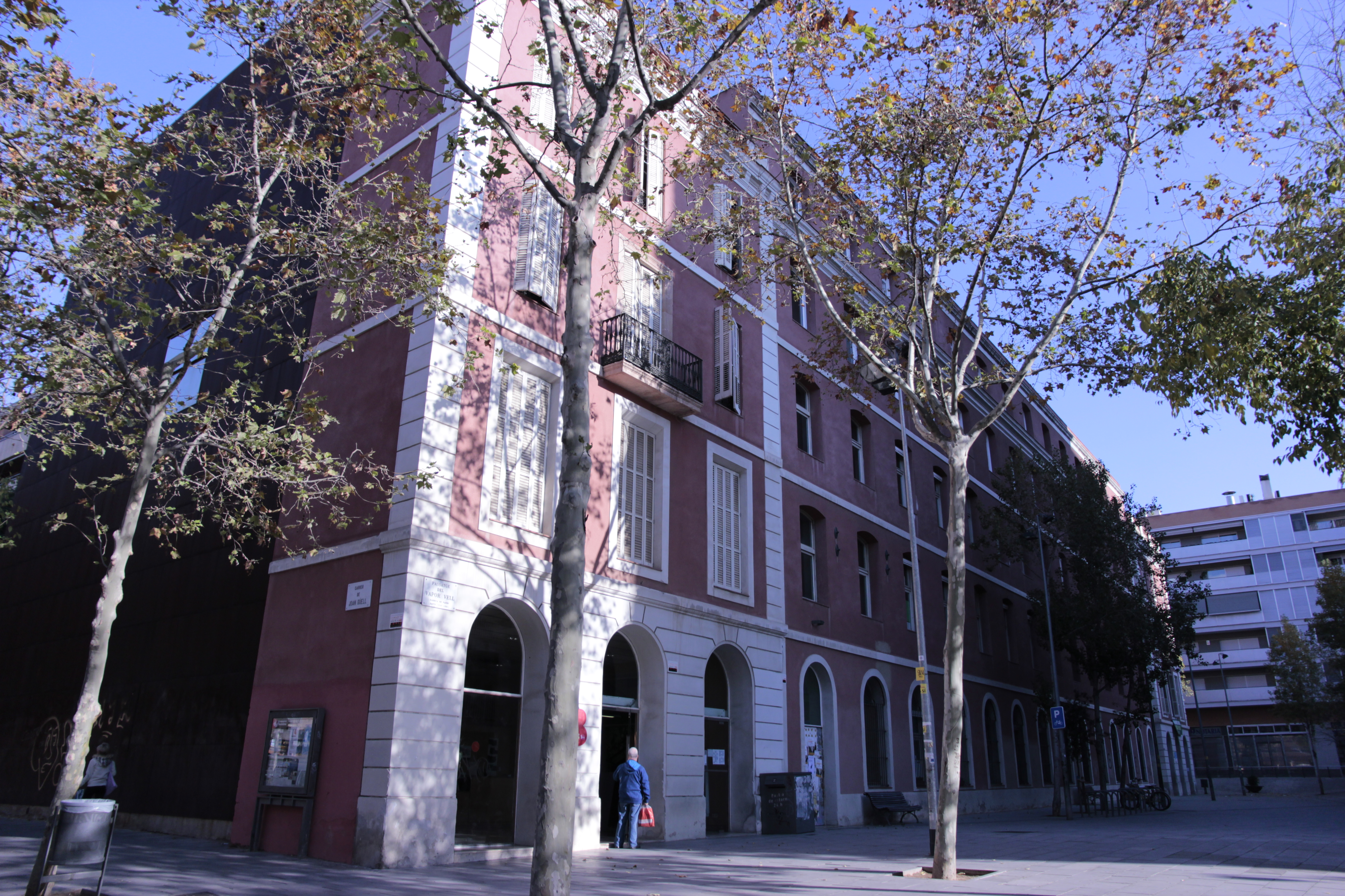 Fotografia feta des de C/Joan Güell